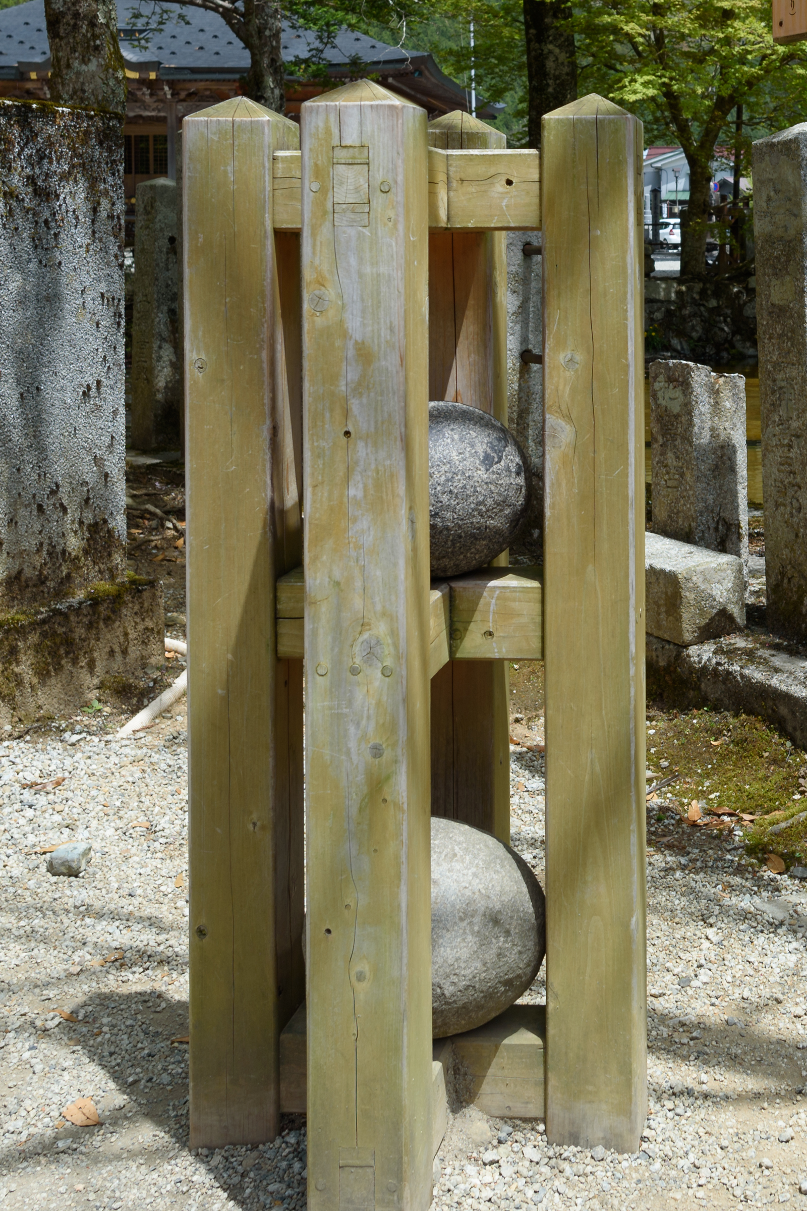 洞川の龍泉寺なで石